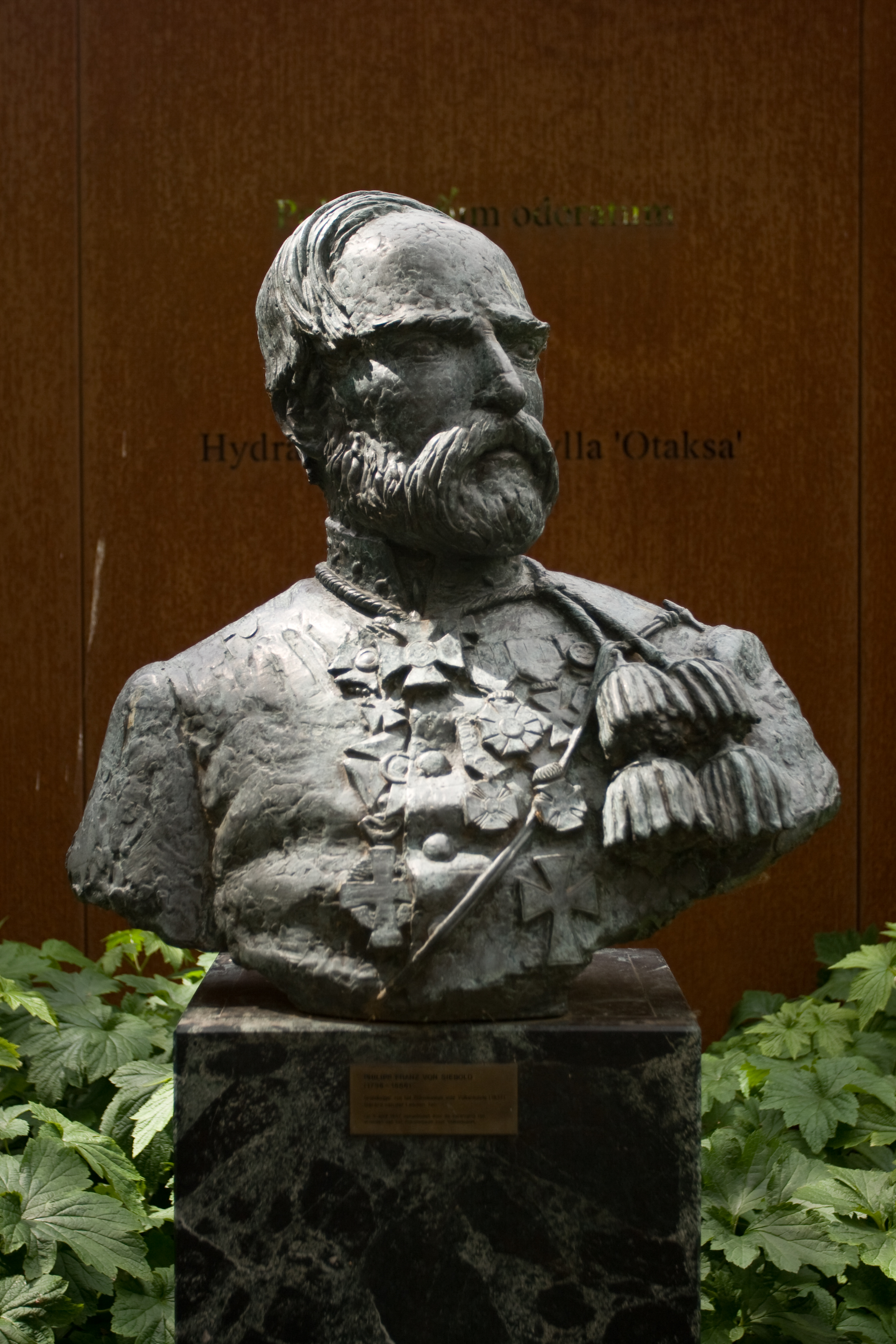 Buste van Philipp Franz von Siebold door Gerard van der Leeden A copy of this sculpture can be seen at Akatsuki Park, Tokyo (Japan) Another one is located in Leiden